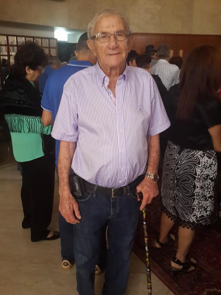 שייע גלזר בטקס הענקת אות יקיר תל אביב. צילום: אלי אלון